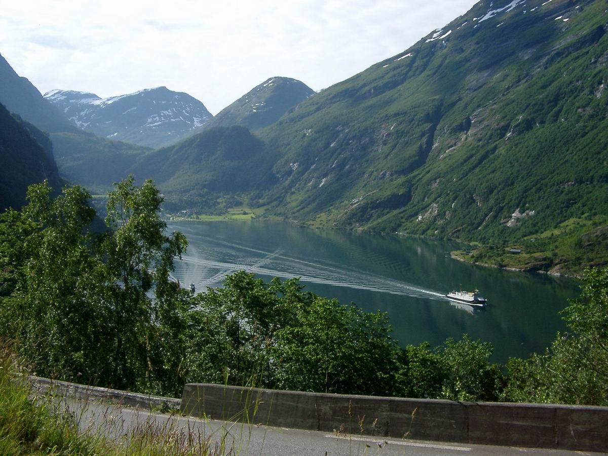 Geiranger Norwegen